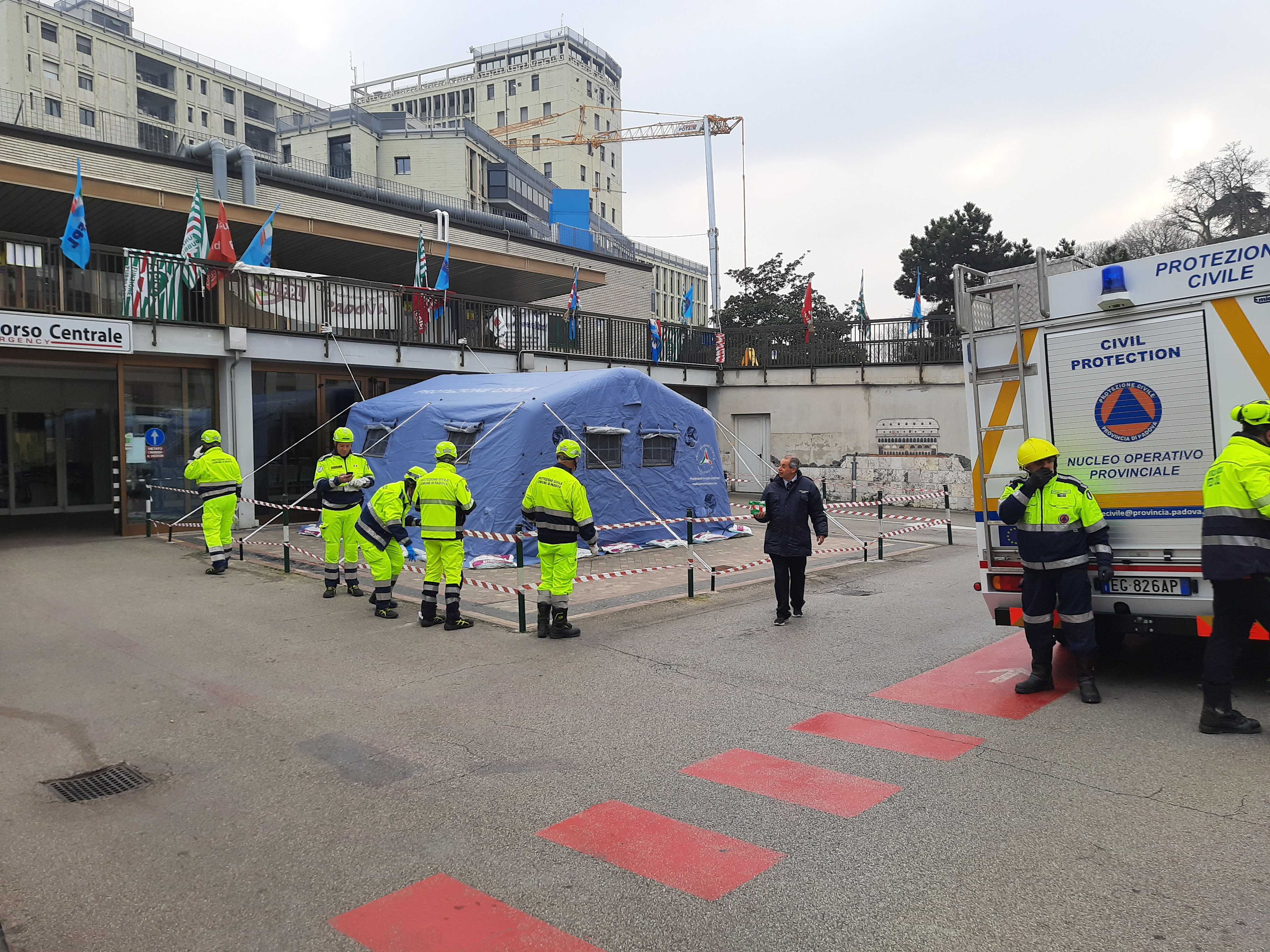 Volontari della Protezione Civile installano una tenda presso il pronto soccorso dell'Azienda Ospedale-Università di Padova per fronteggiare l'epidemia di SARS-CoV-2 il 24 febbraio 2020.